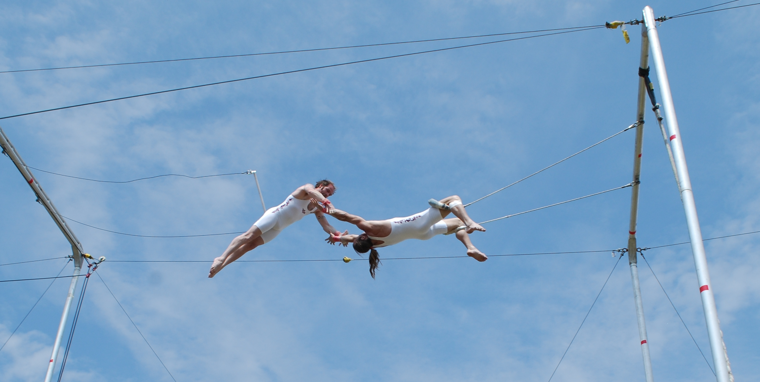 מופע טרפז מעופף בגני התערוכה